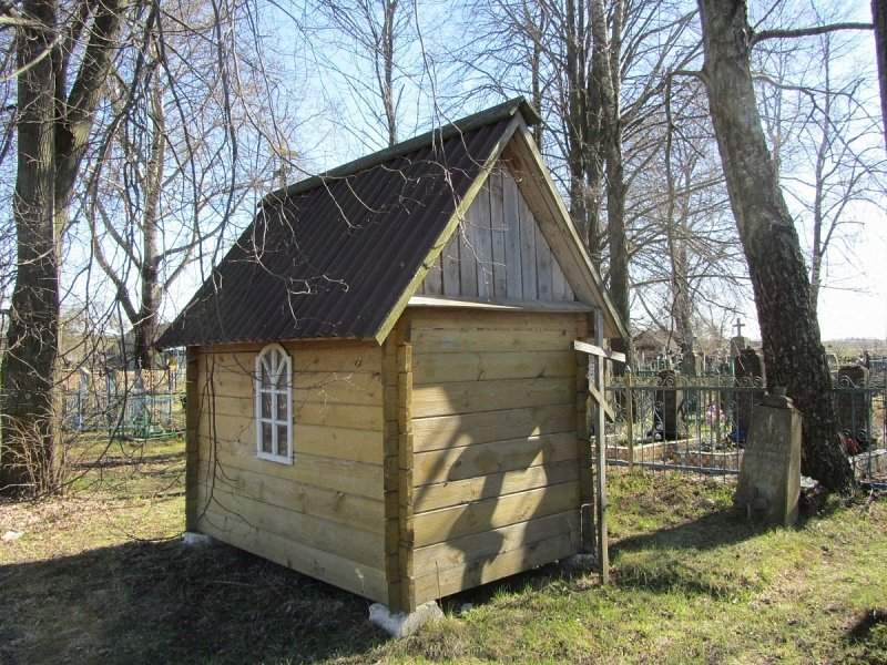 Возерскае. Каплічка